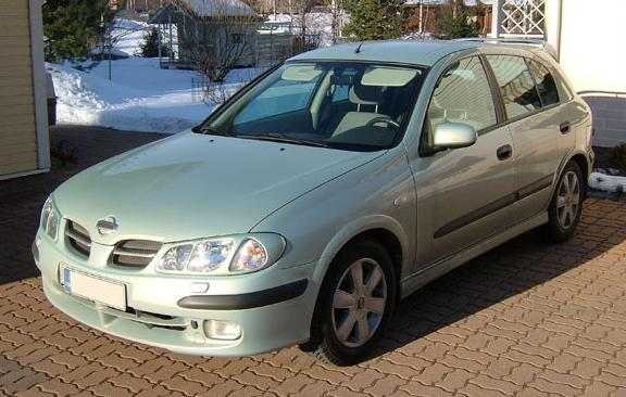 Five door Nissan Almera 2002.